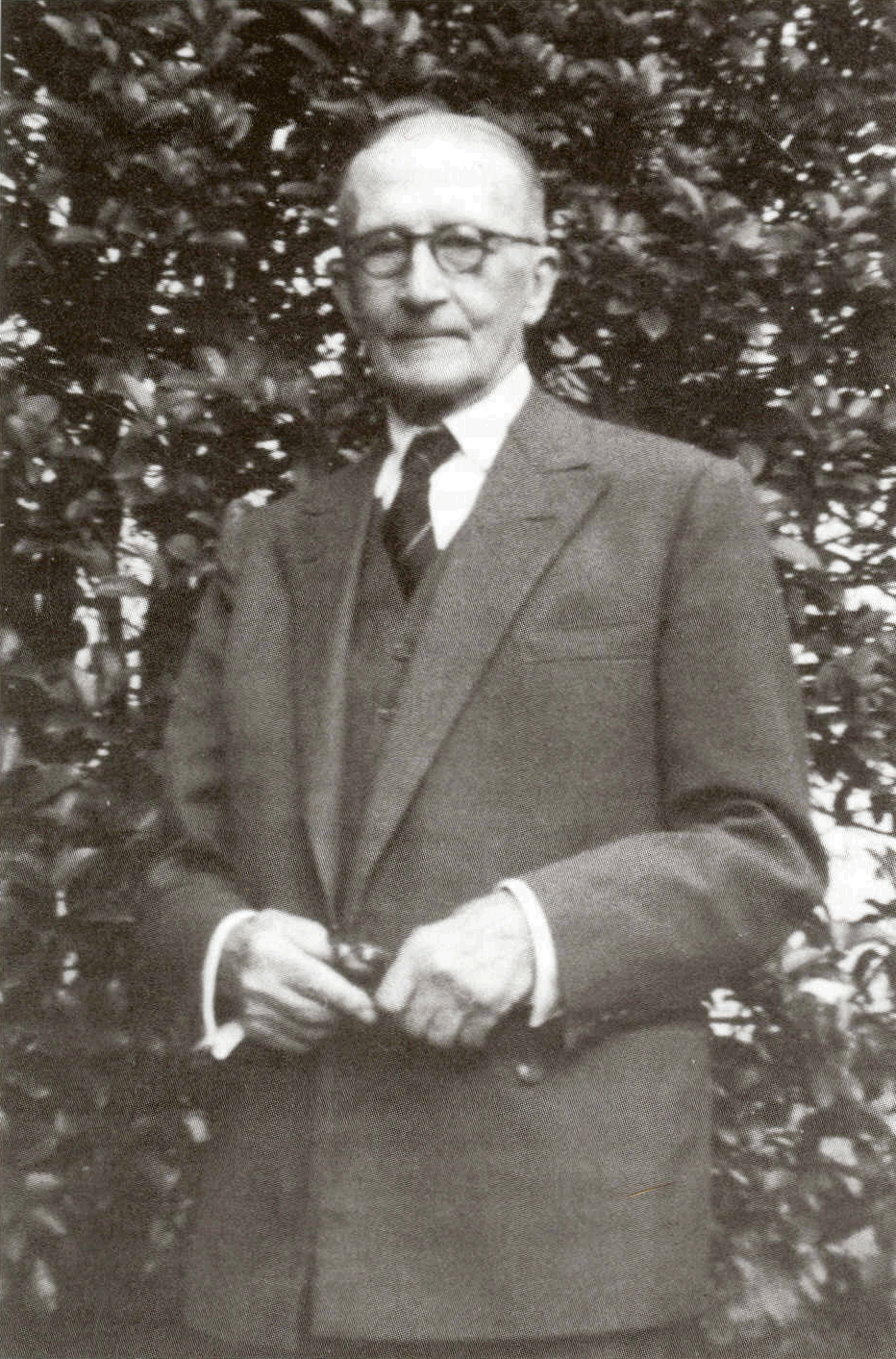 Enrico Crespi, fondatore dell'associazione La Famiglia Bustocca.